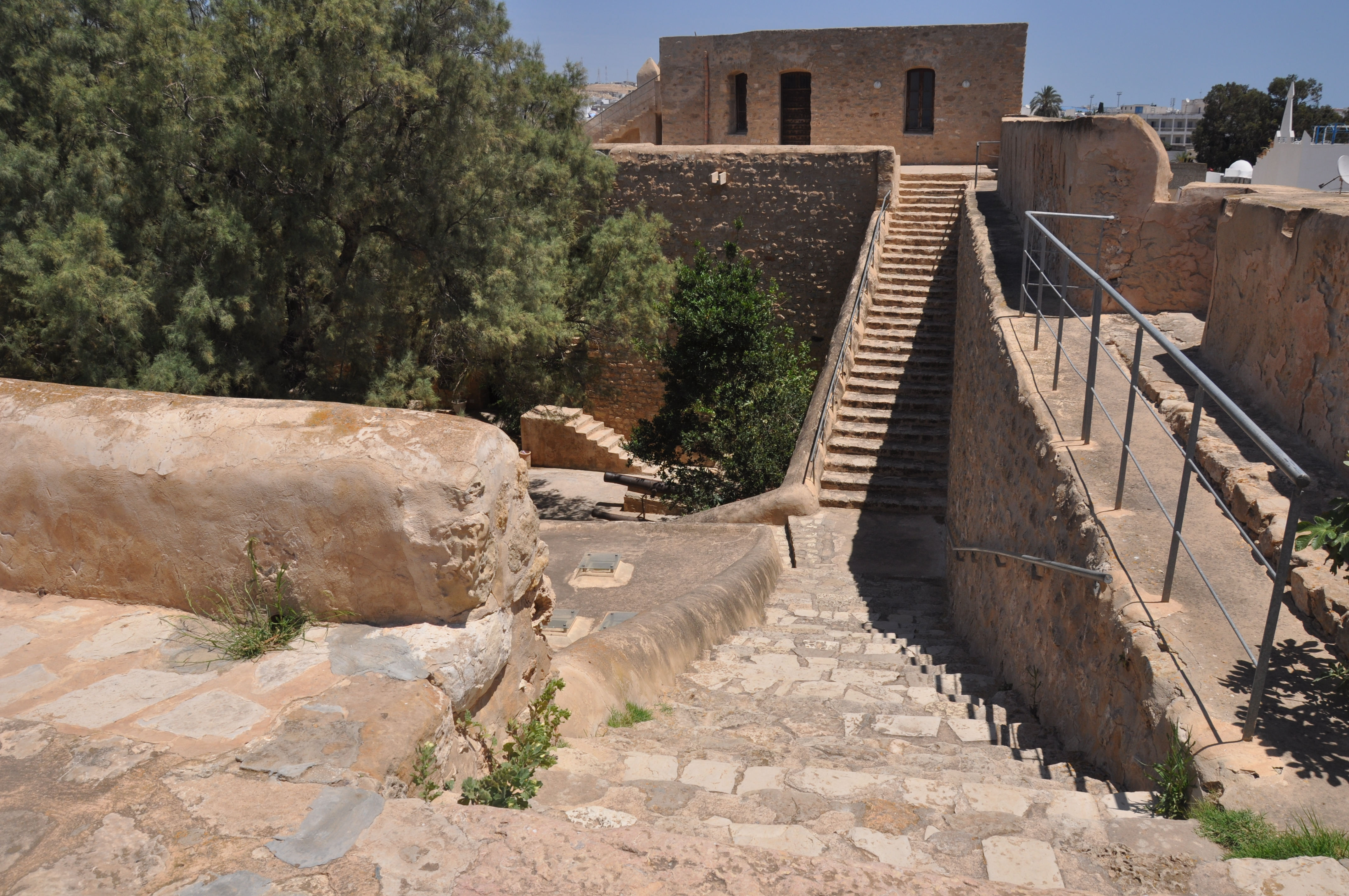 Kasbah